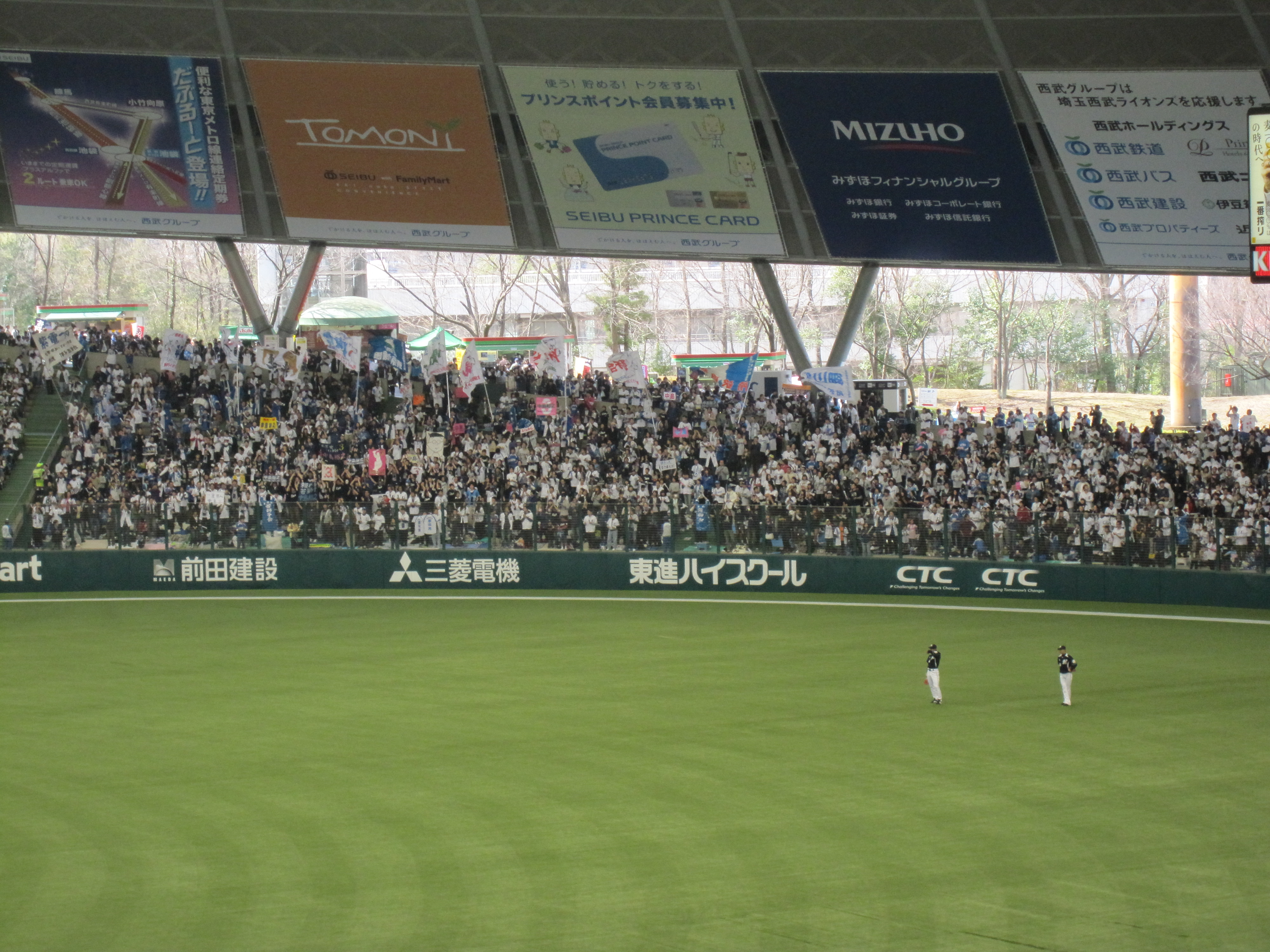 2009年よりレフト側に移った西武応援席の応援風景。